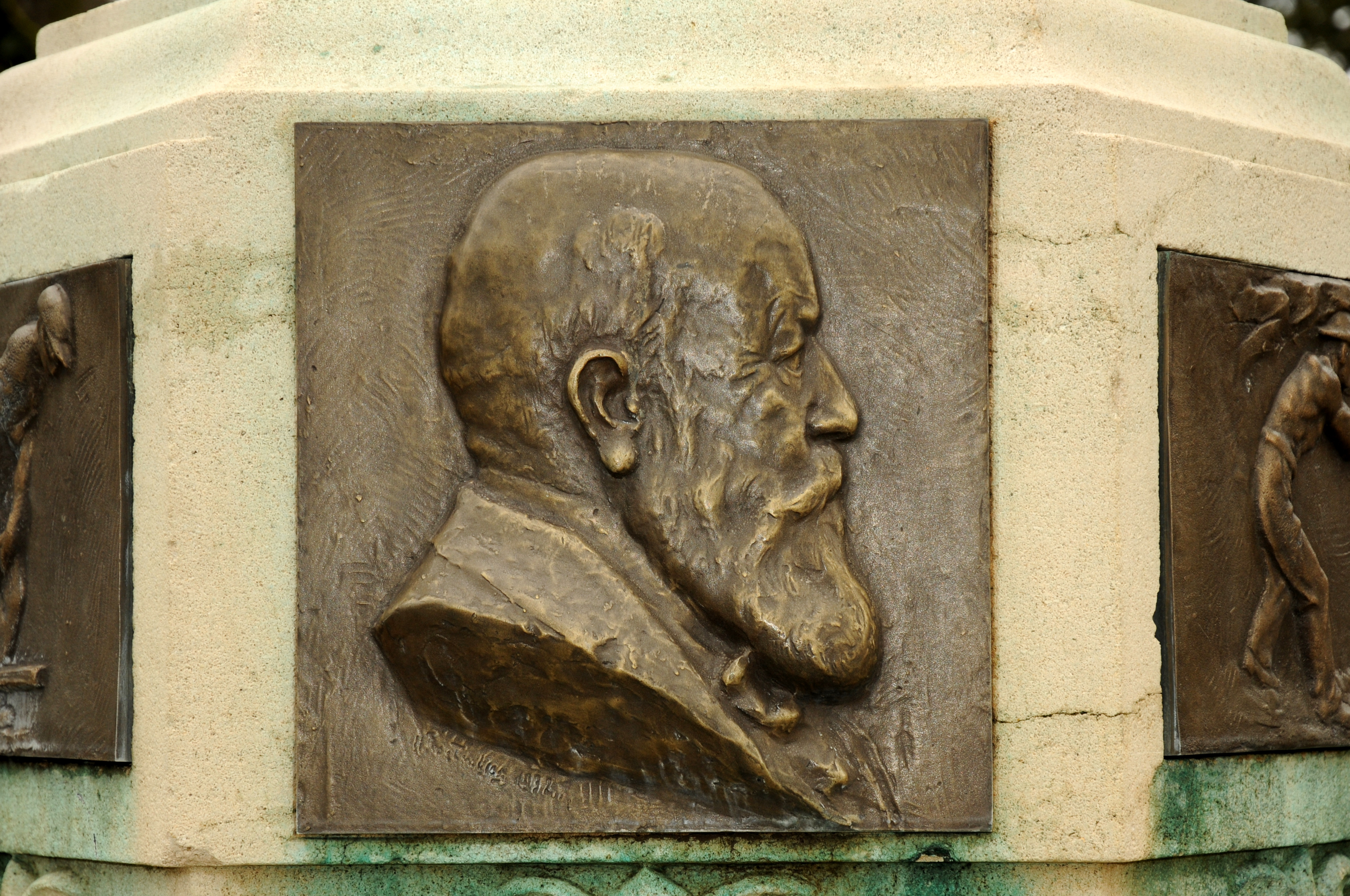 Plak um Monument Émile Mayrisch, zu Diddeleng.